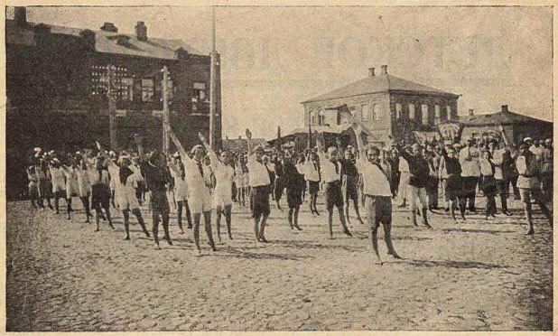 Беларуская (тарашкевіца): Ігумен (Ihumien), пляц Рынак (plac Rynak)